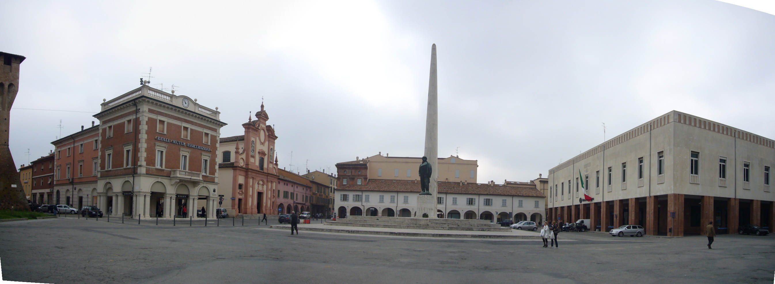 Lugo di Romagna, piazza Baracca